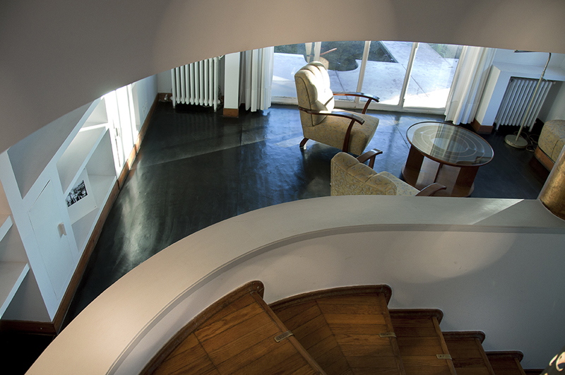 Casa del Arq. Julio Vilamajó. Ubicada en el departamento de Montevideo